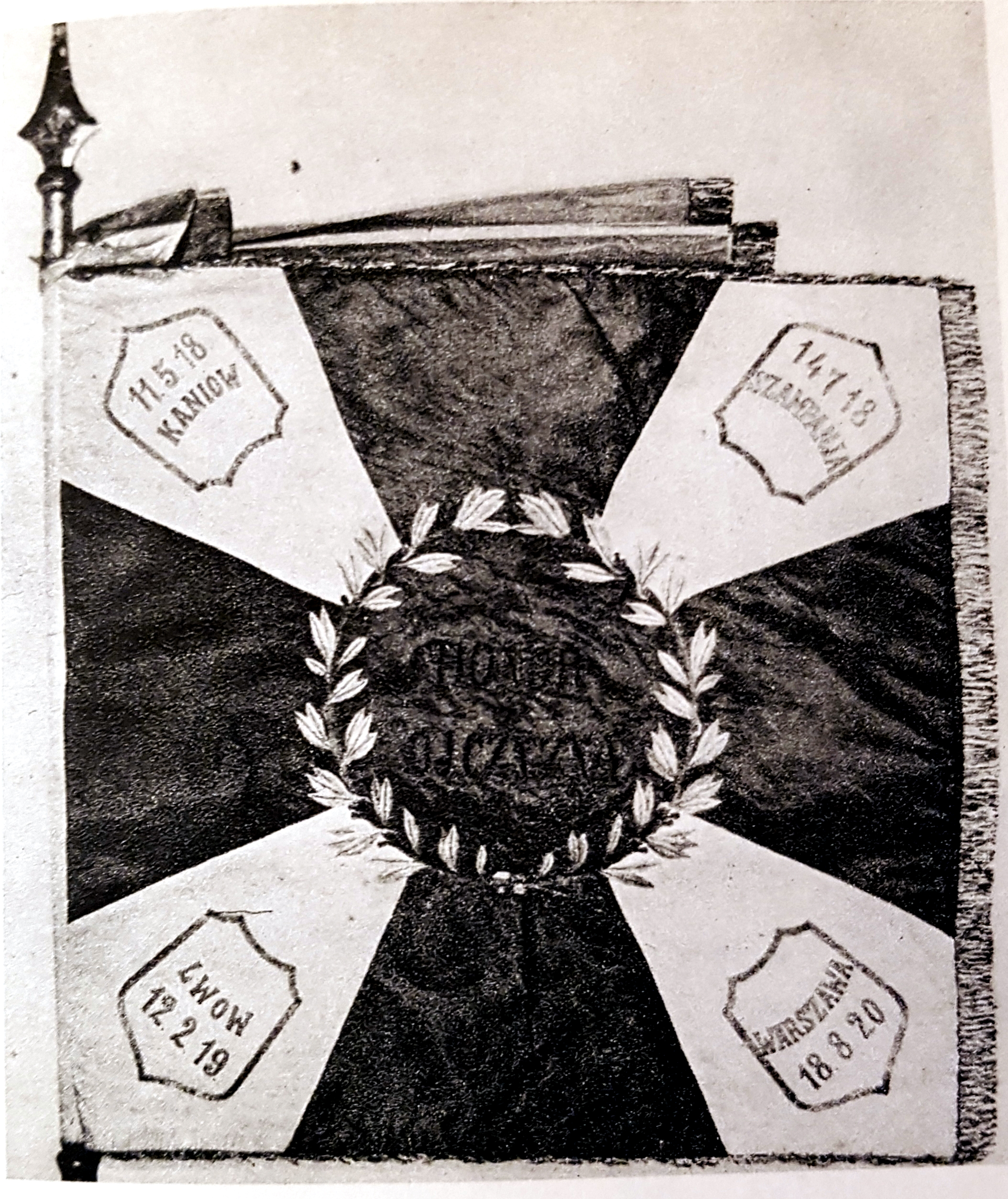 prawa strona sztandaru 2 pułku saperów kaniowskich